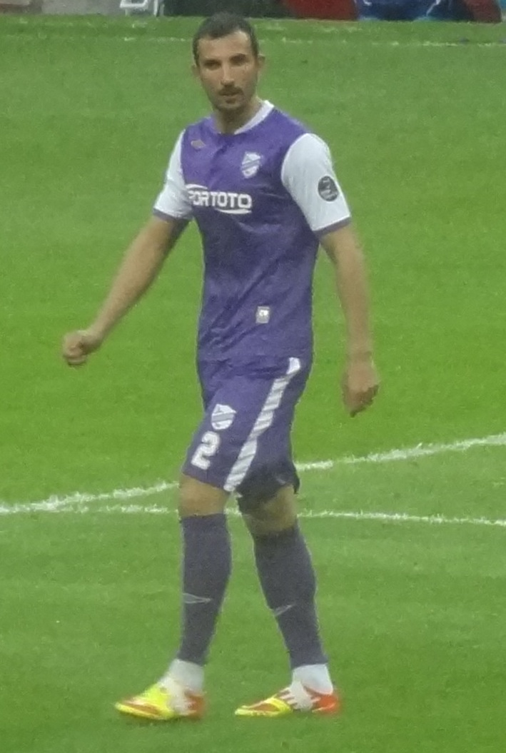 Yalçın GS Maçında